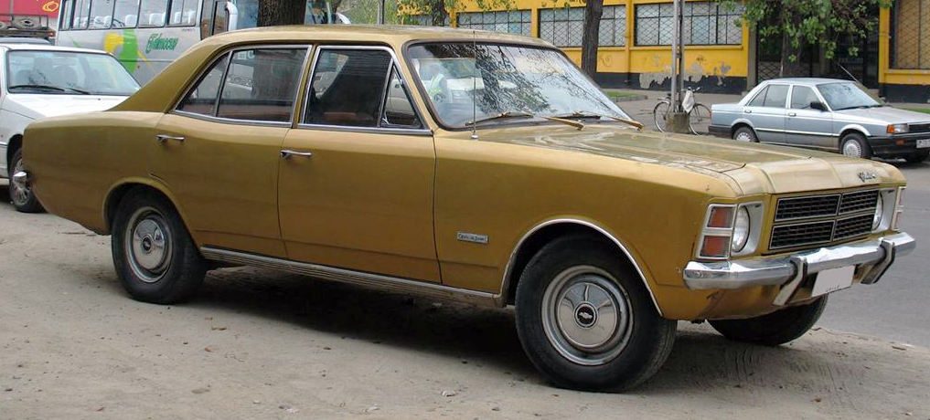 1978 Chevrolet Opala Deluxe Sedan in Chile